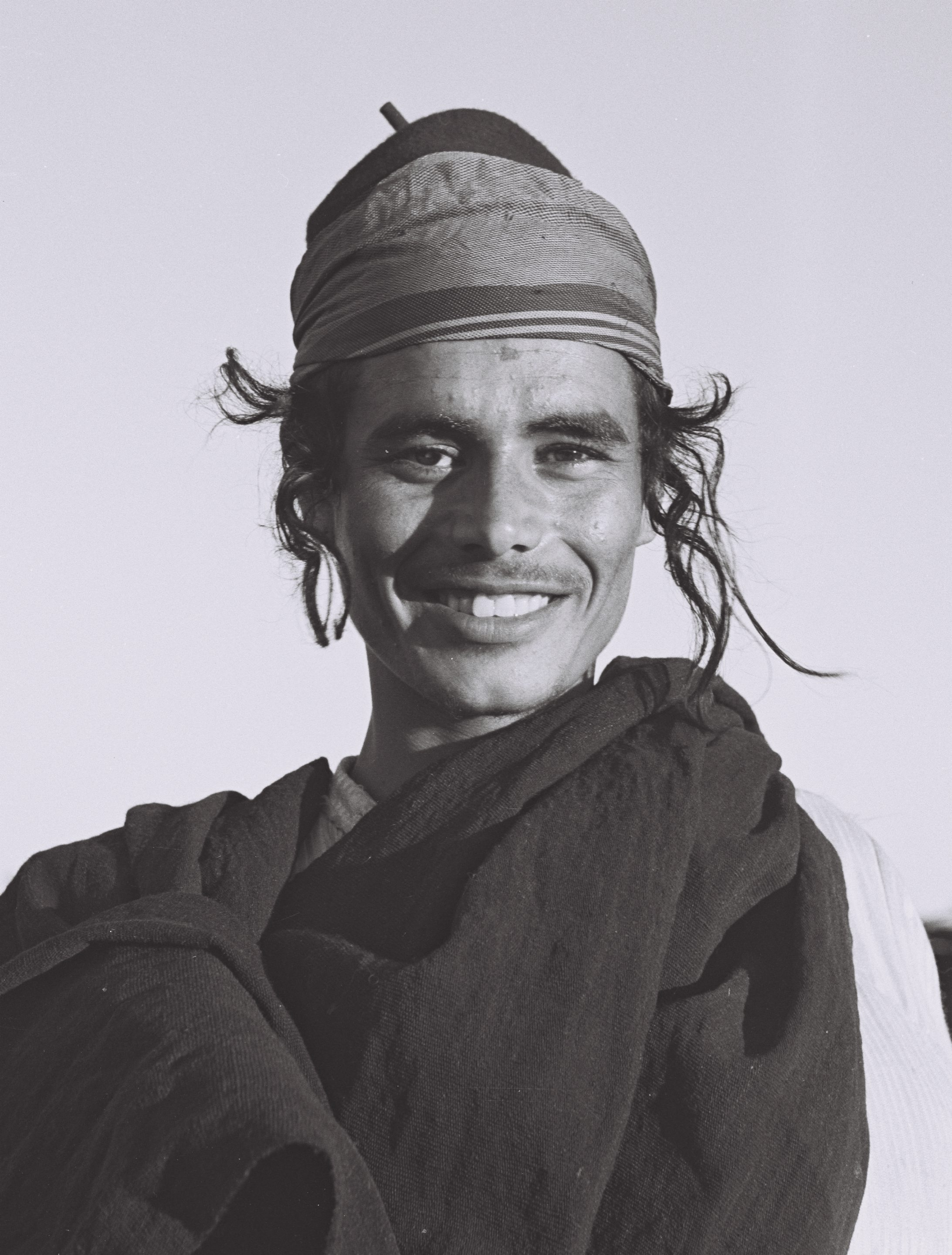 A YOUNG YEMENITE MAN.